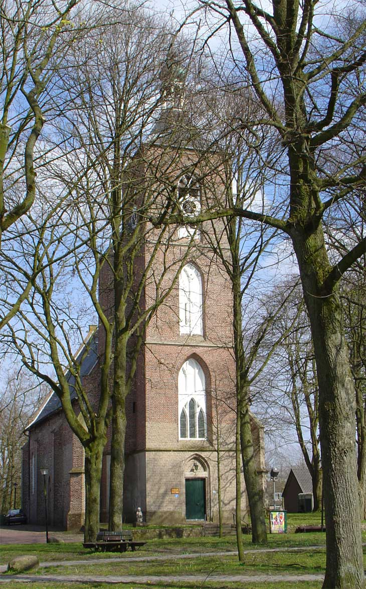 Kerk op de brink van Ruinen